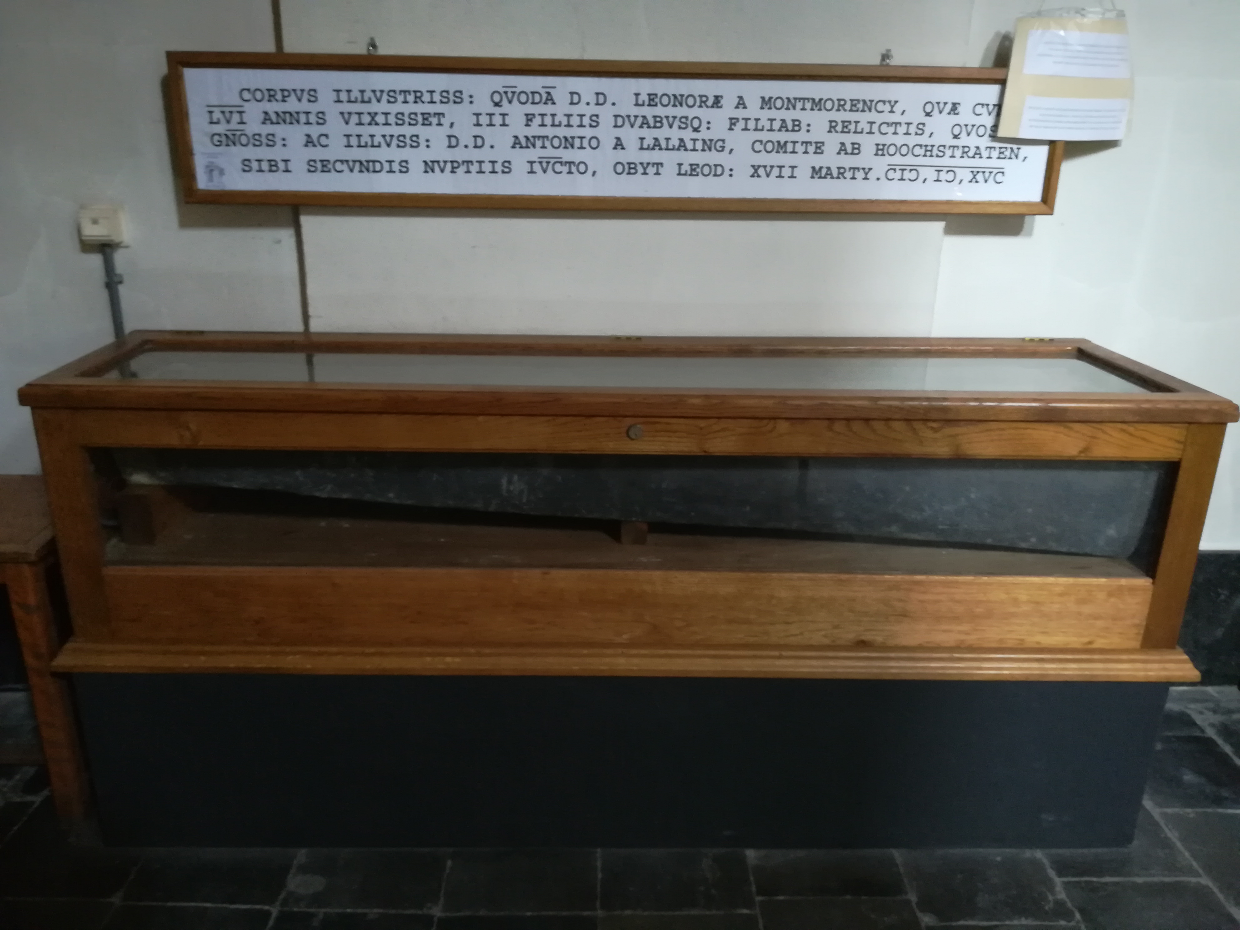 Loden grafkist in glazen bekisting van gravin Eleonora van Montmorency.